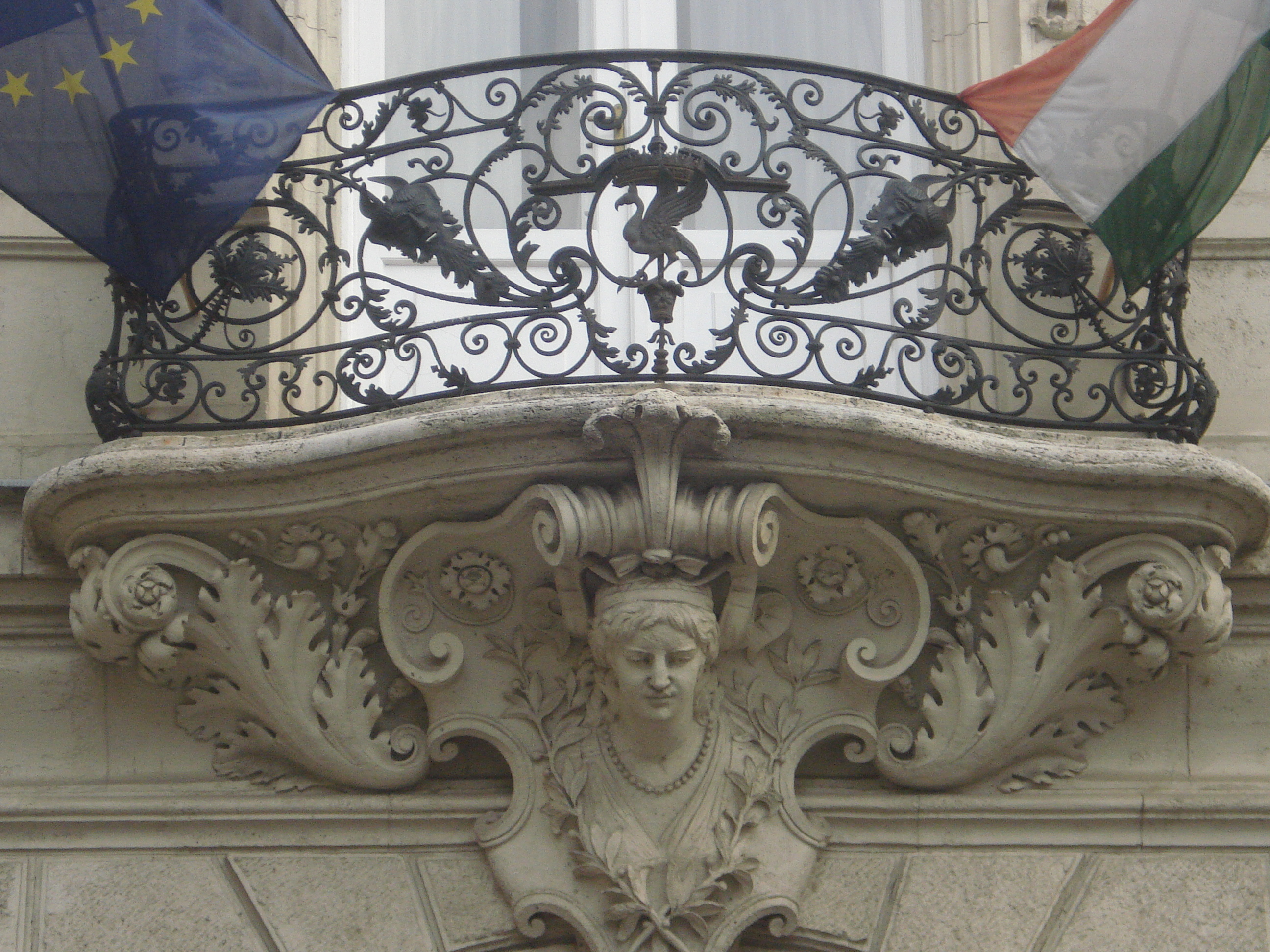 Károlyi-palota (1881, Wechselmann Ignác), /Károlyi-Csekonics Rezidencia/ Budapest VIII. kerület Múzeum utca 17. This is a photo of a monument in Hungary. Identifier: 11188